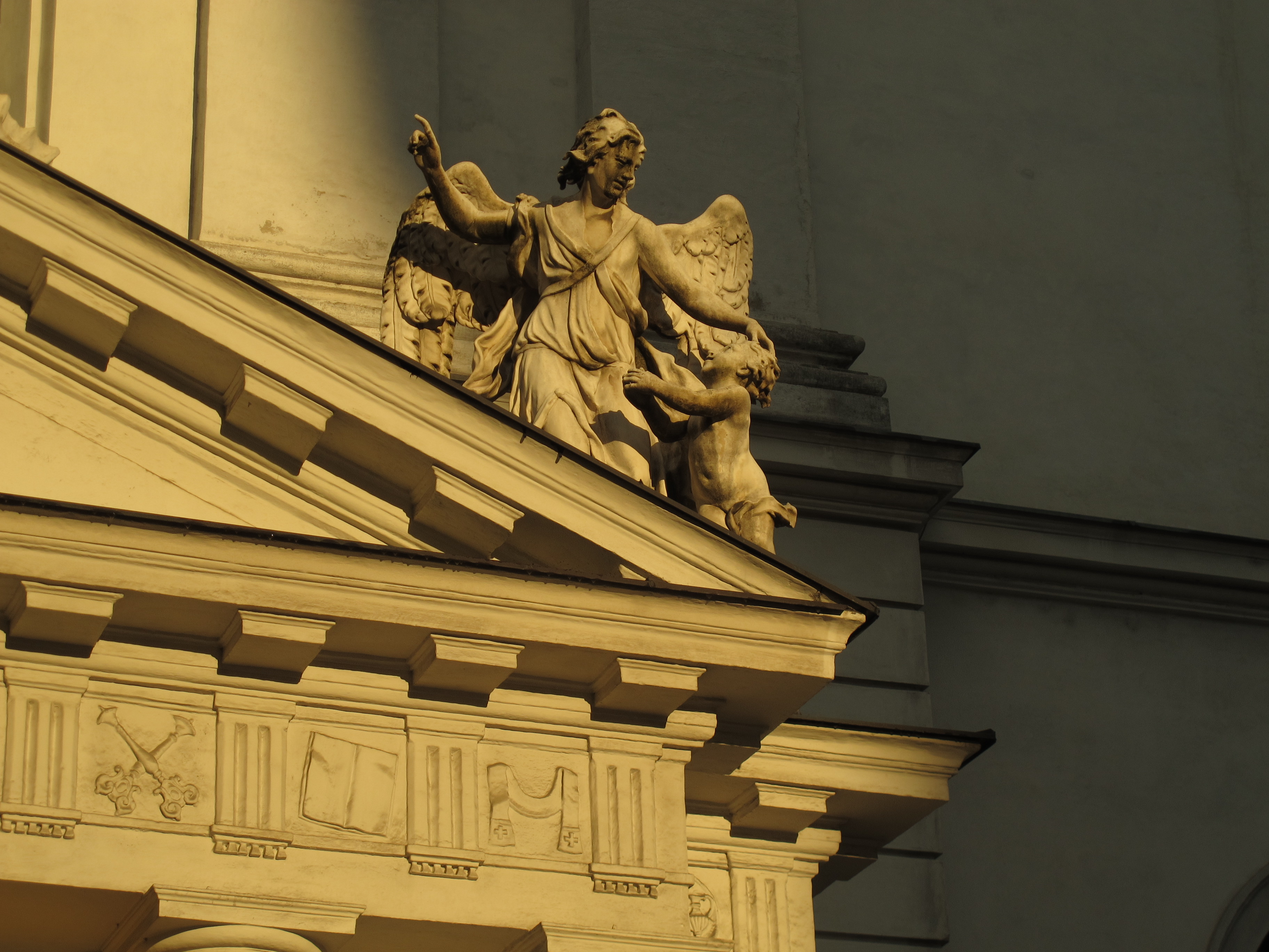 Esculturas sobre el entablamento del pórtico de acceso principal de la iglesia de San Miguel en Viena, en la plaza del mismo nombre.